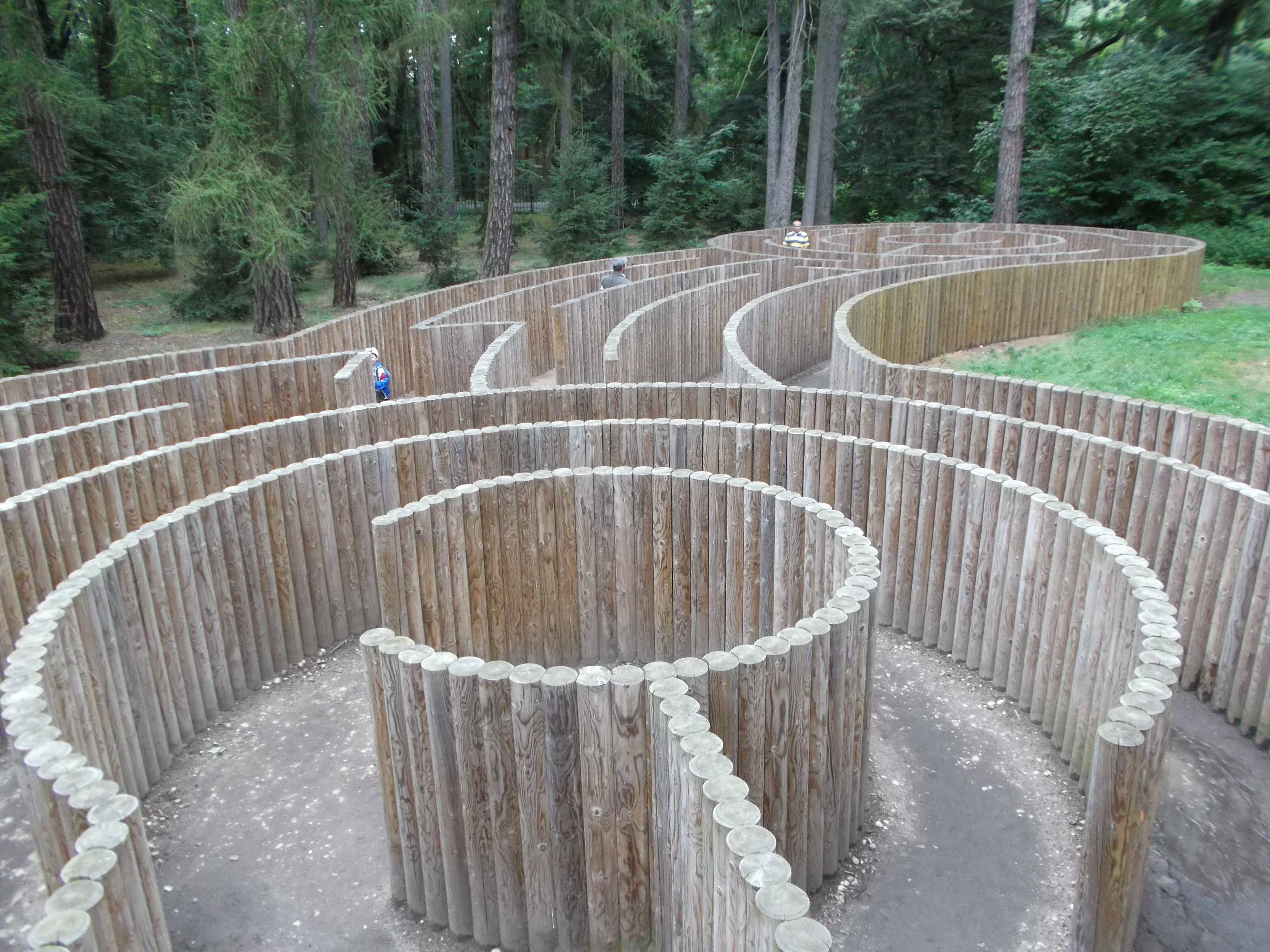 Palisádové bludiště v zámeckém parku v Loučeni. Bludiště číslo 6.